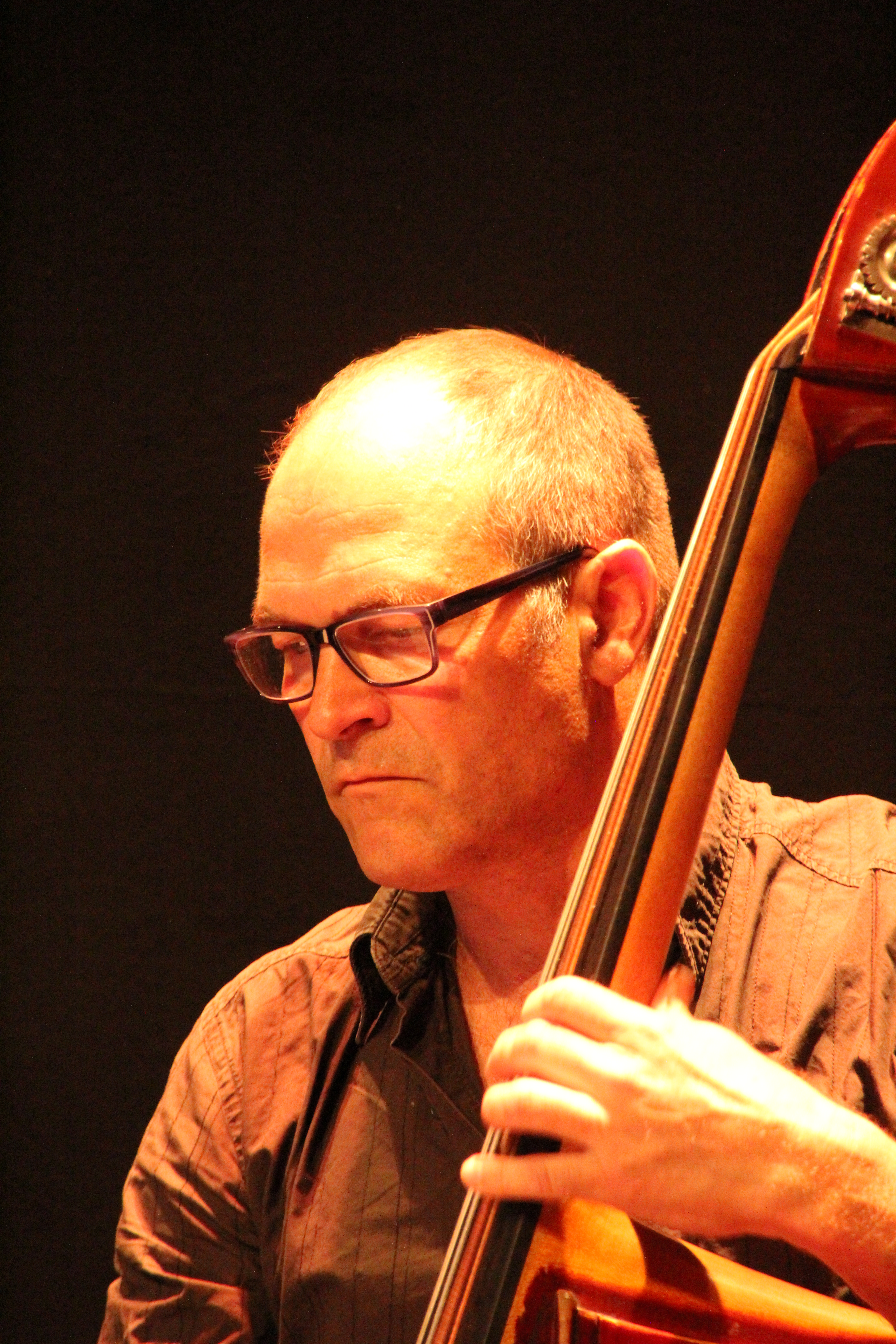 Bildinhalt: Dietmar Fuhr bei einem Konzert mit Daniel Guggenheim in der Frankfurter Romanfabrik Aufnahmeort: Frankfurt am Main, Deutschland Die dargestellte Person wurde bei einem öffentlichen Auftritt fotografiert.